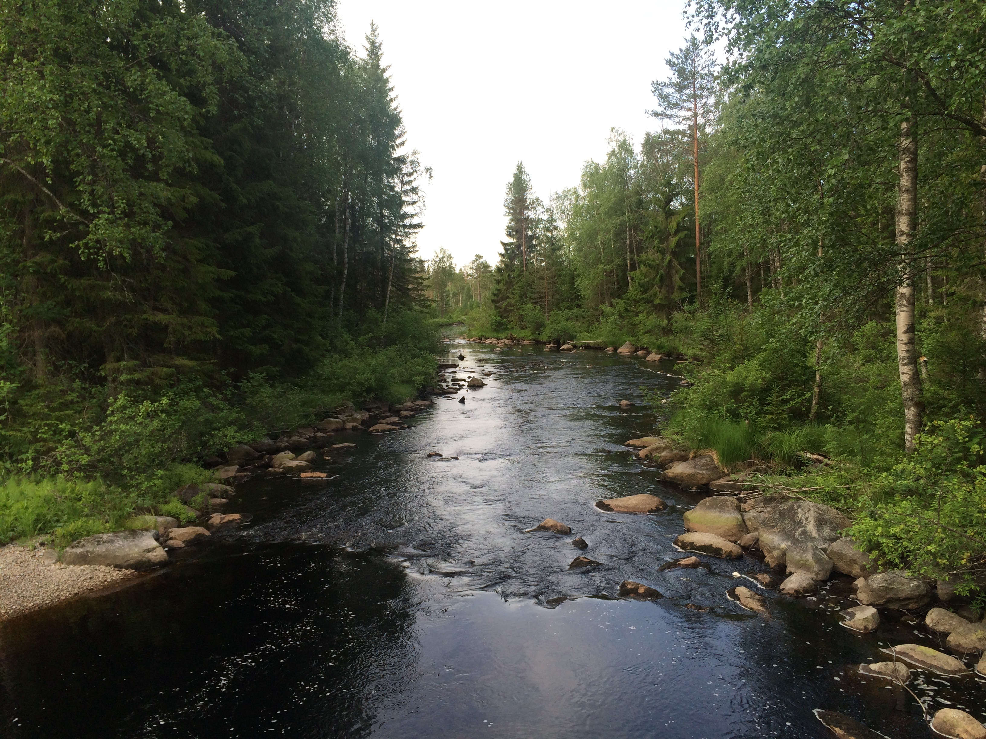 Вегарусйоки